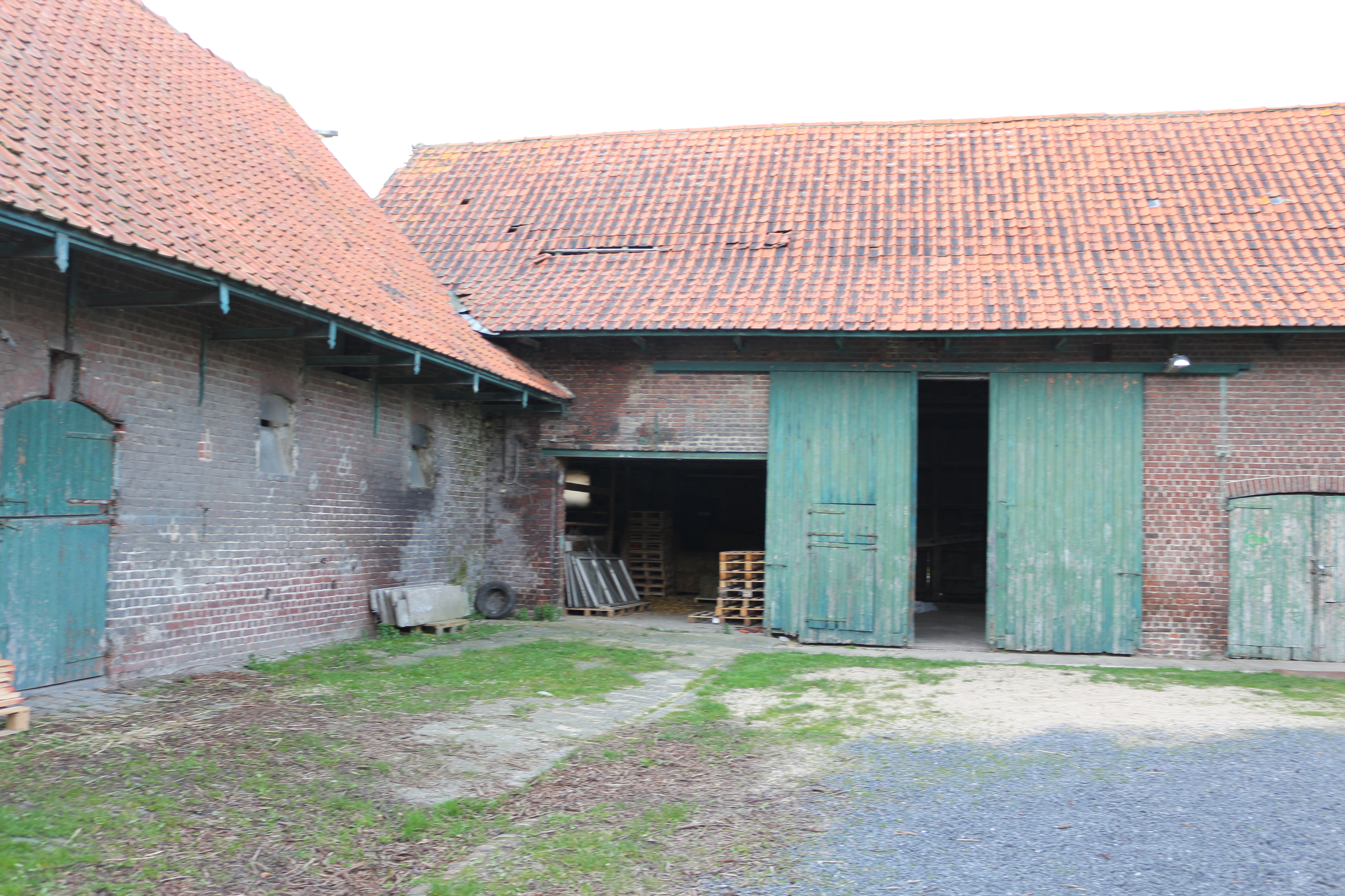 dwarsschuur met wagenhuis, gezien vanop de binnenkoer.